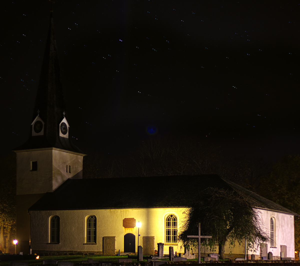 Örslösa kyrka